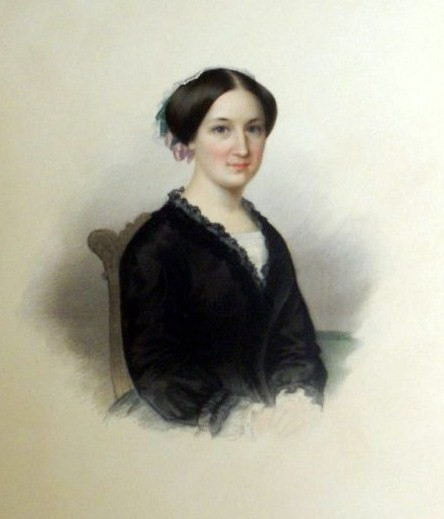 Павла Ивановна Дашкова, ур. Бегичева (1817—24.09.1887)